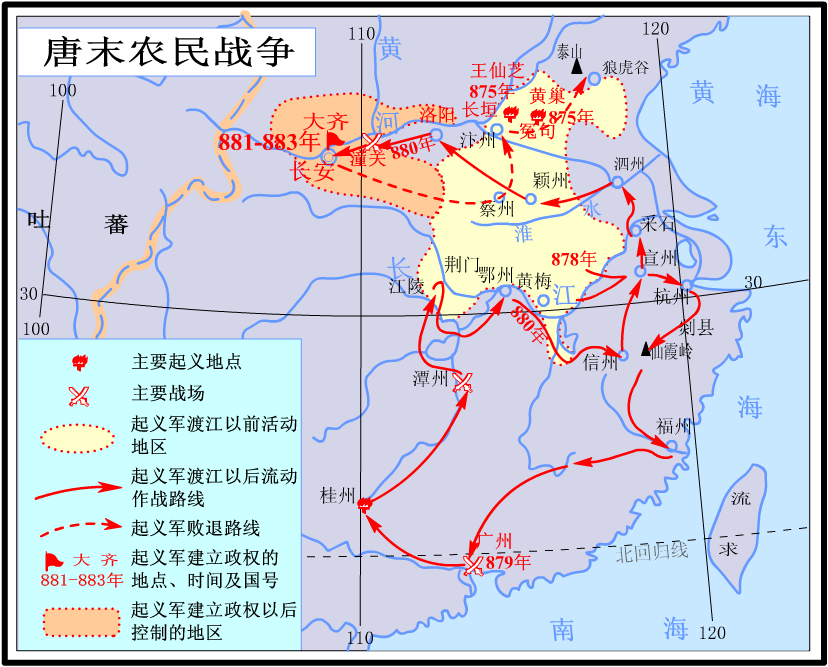 唐末农民战争形势图 绘制人：竹围墙